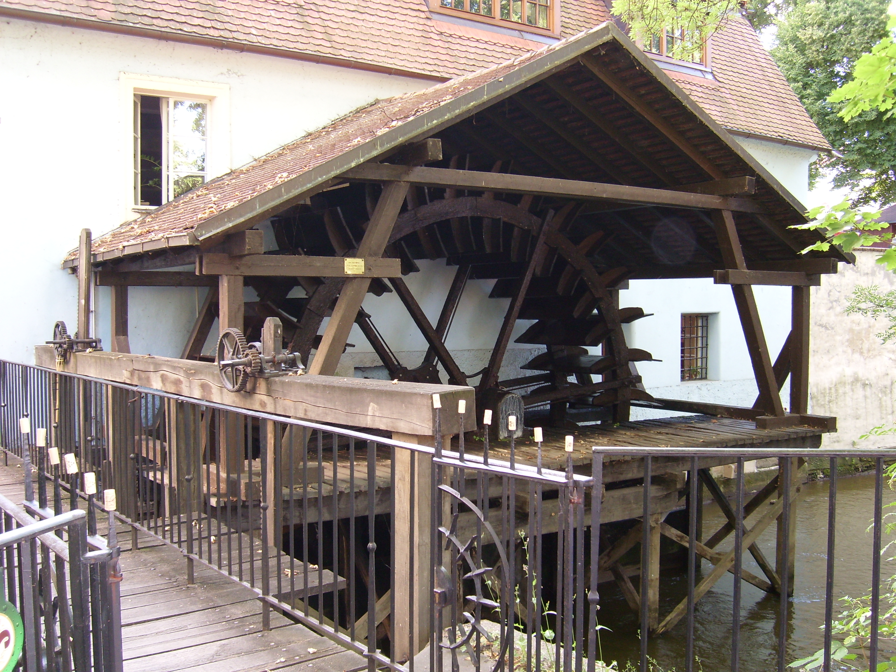 Čertovka, Mlýn Huť